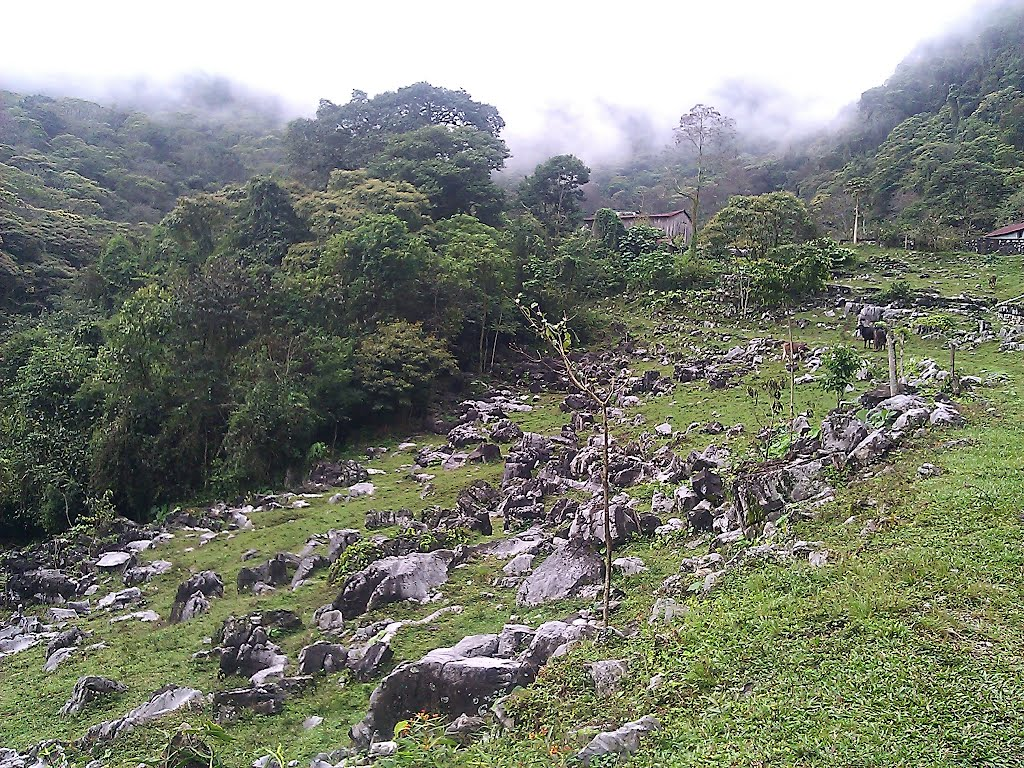 Rancho Avendaño, Cerro Central